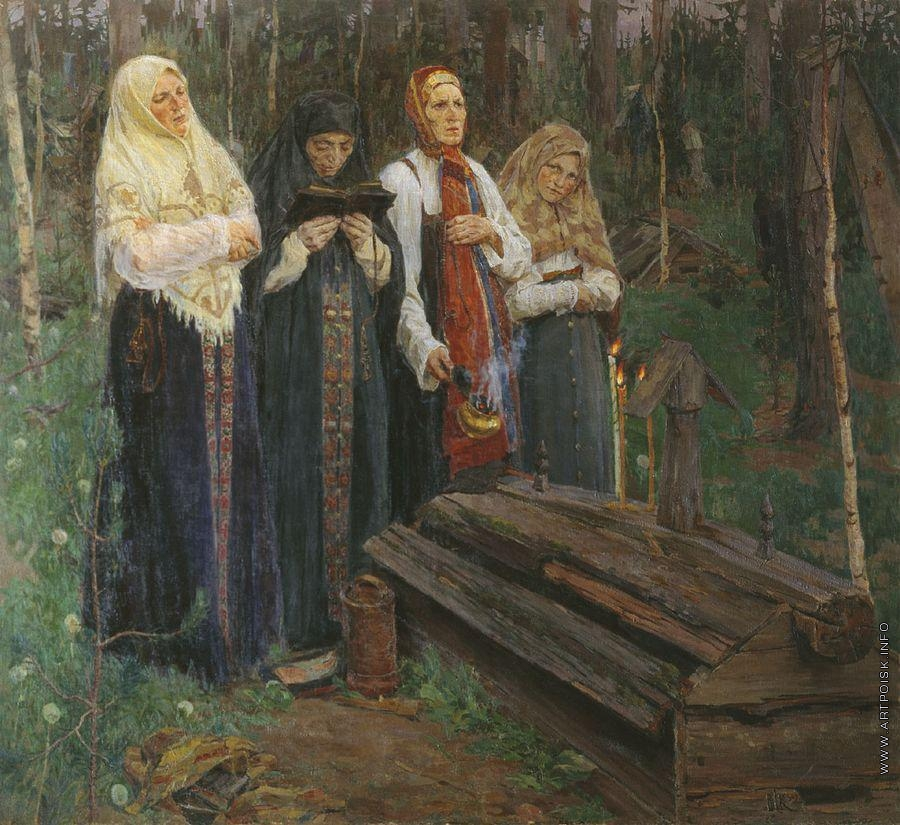 «Канун»